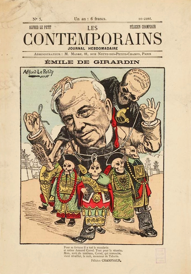 Les Contemporains, hebdomadaire n°41, 1881. Émile de Girardin (1806-1881). Dessin d'Alfred Le Petit